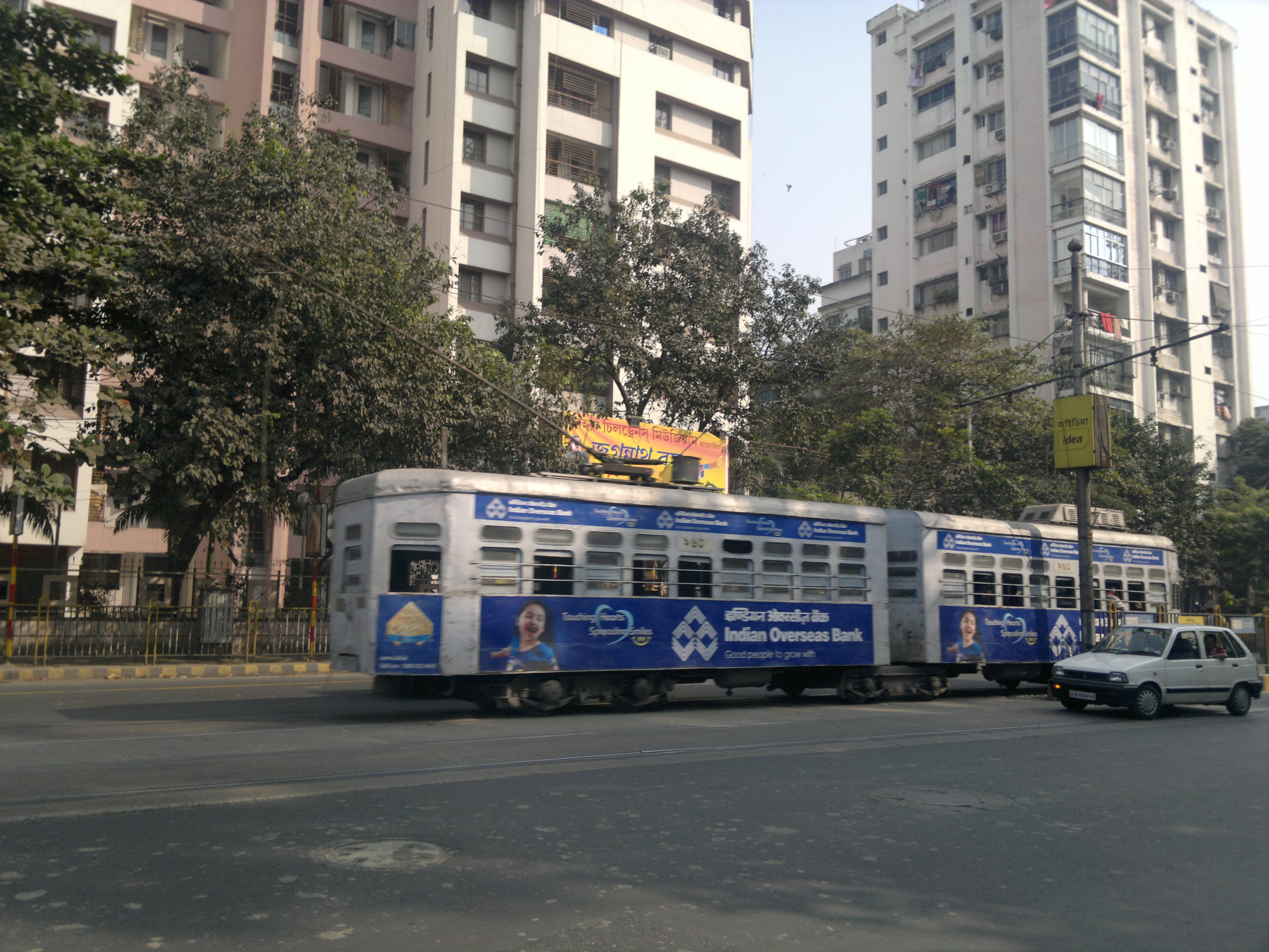 snap of Tram in Kolkata